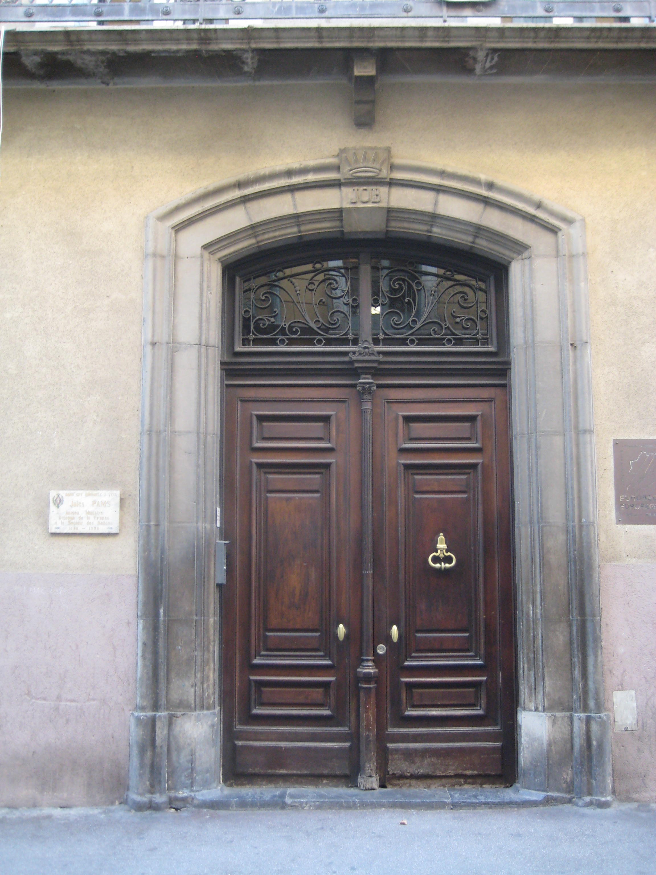 Hôtel Pams, à Perpignan (France) This building is en partie classé, en partie inscrit au titre des Monuments Historiques. .